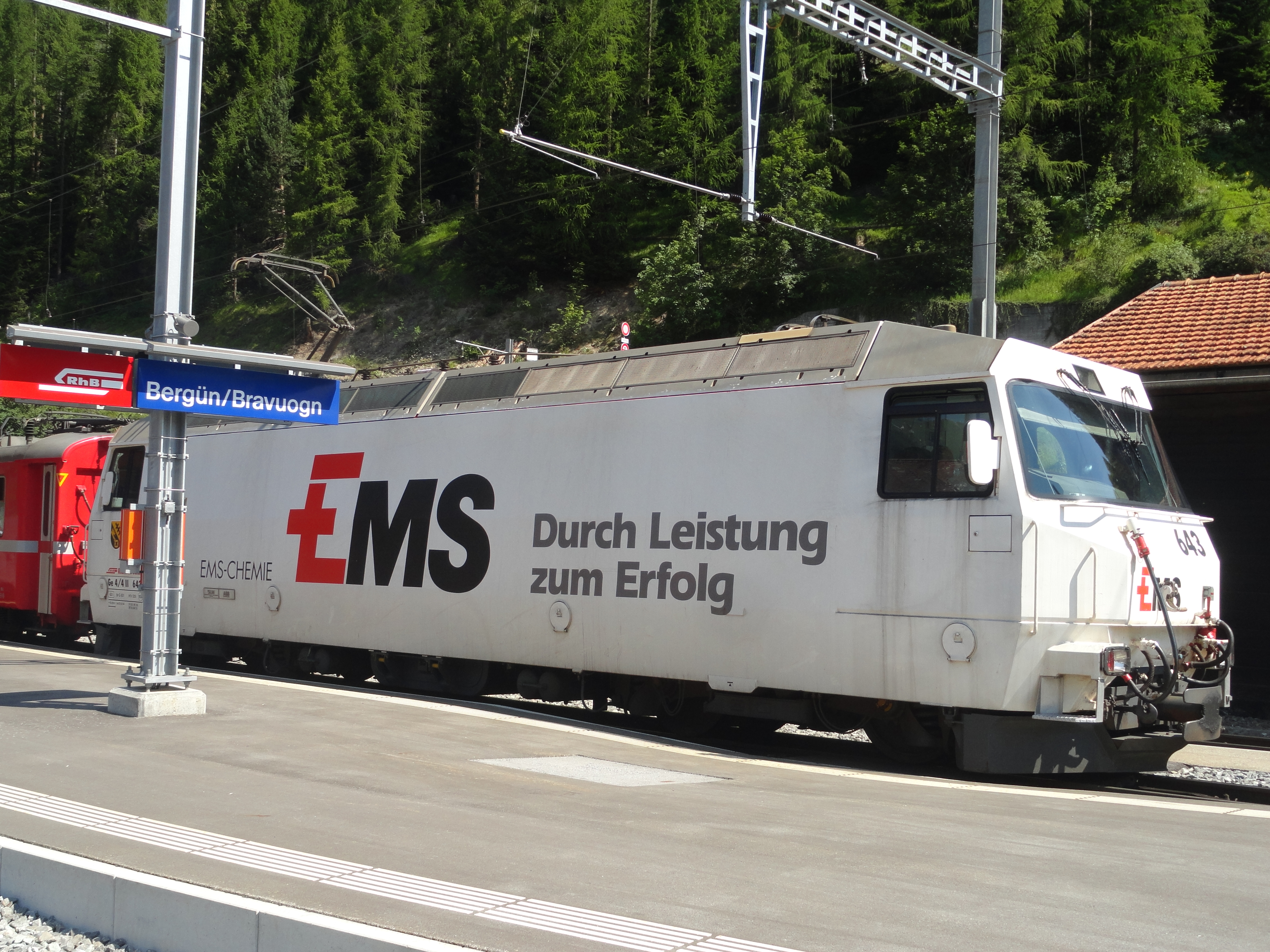 Ems Chemie auf einer Lok der Rhätischen Bahn